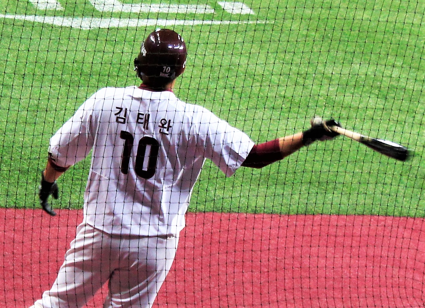 넥센 히어로즈의 김태완 선수